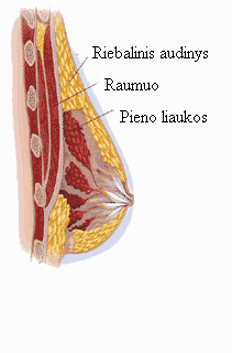 Transferred from lt.wikipedia to Commons by Maksim. The original description page was here. All following user names refer to lt.wikipedia. Pieno liaukos (en wiki) This work has been released into the public domain by its author, Algirdas at the wikipedia project. This applies worldwide. In case this is not legally possible: Algirdas grants anyone the right to use this work for any purpose, without any conditions, unless such conditions are required by law.